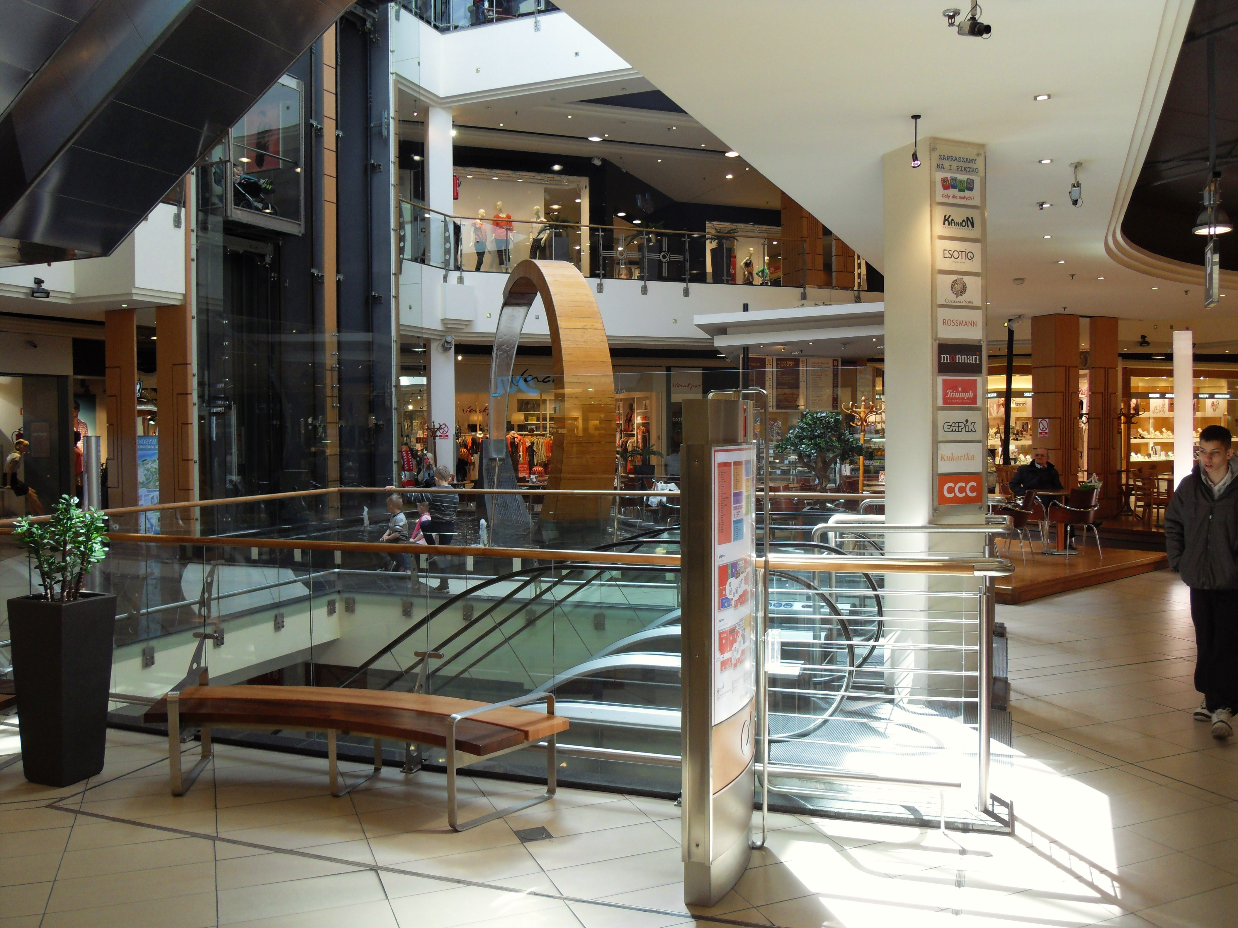 Gdańsk Przymorze. Centrum handlowe Alfa Centrum.